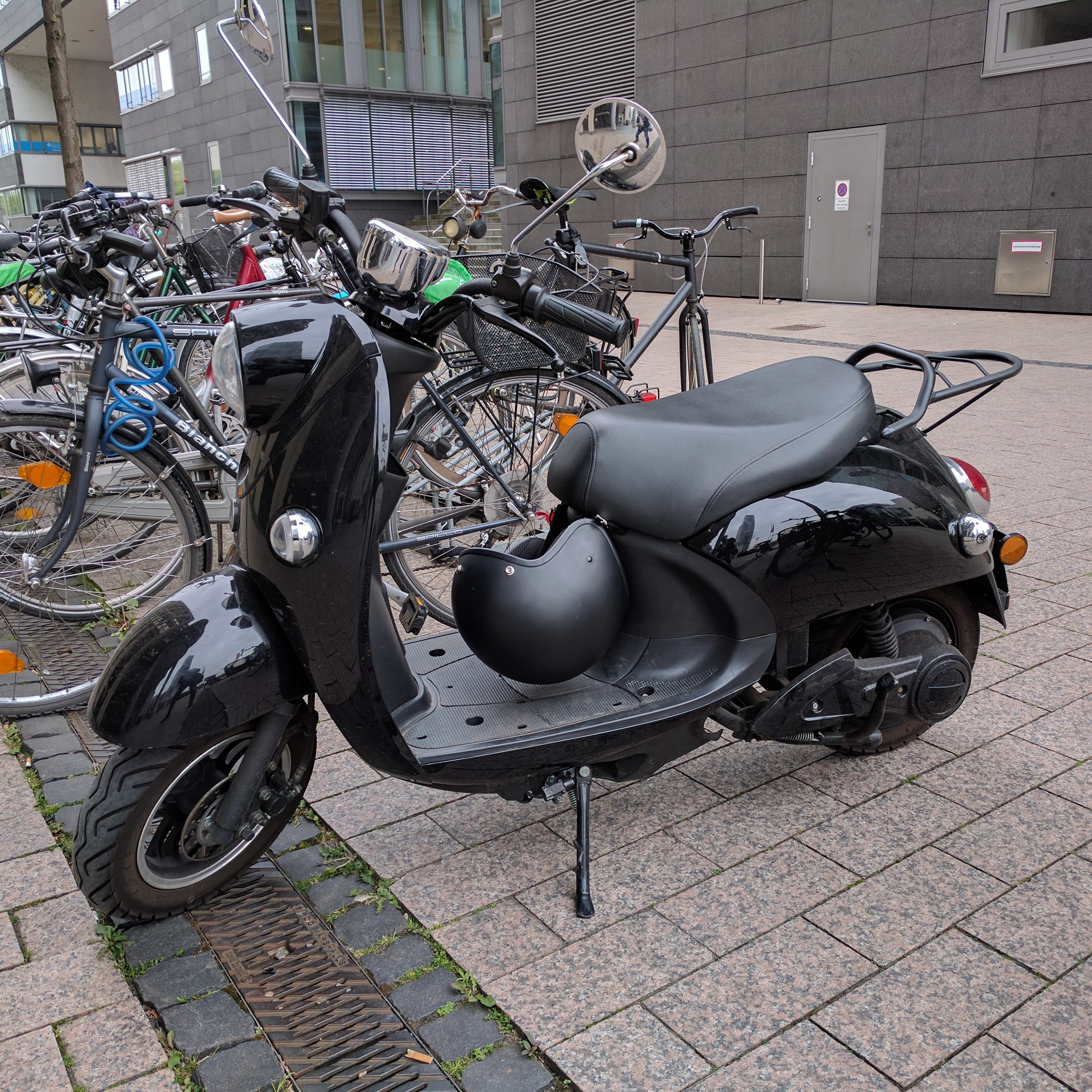 Geparkter Unu-Roller